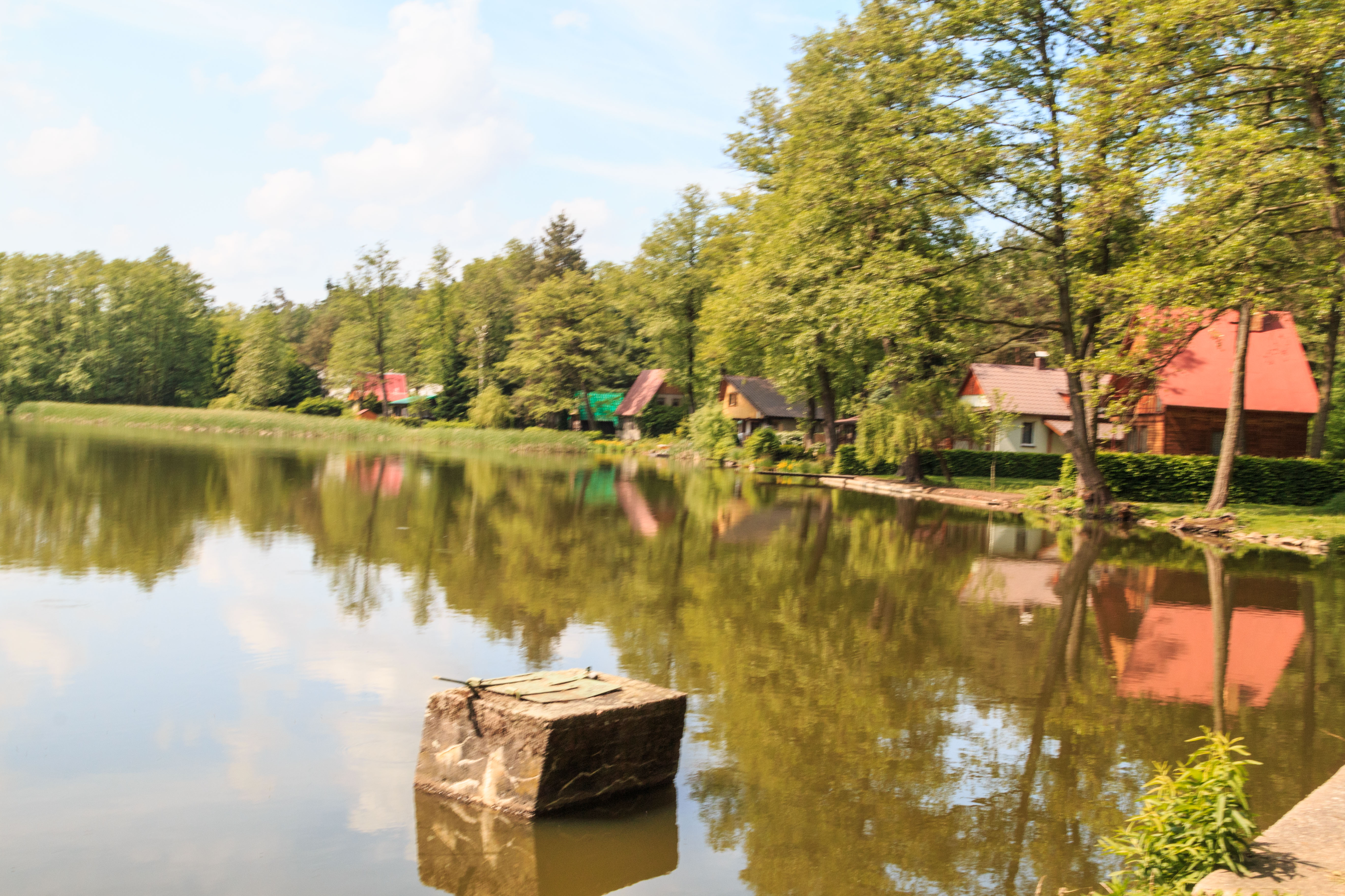 Krasnický rybník